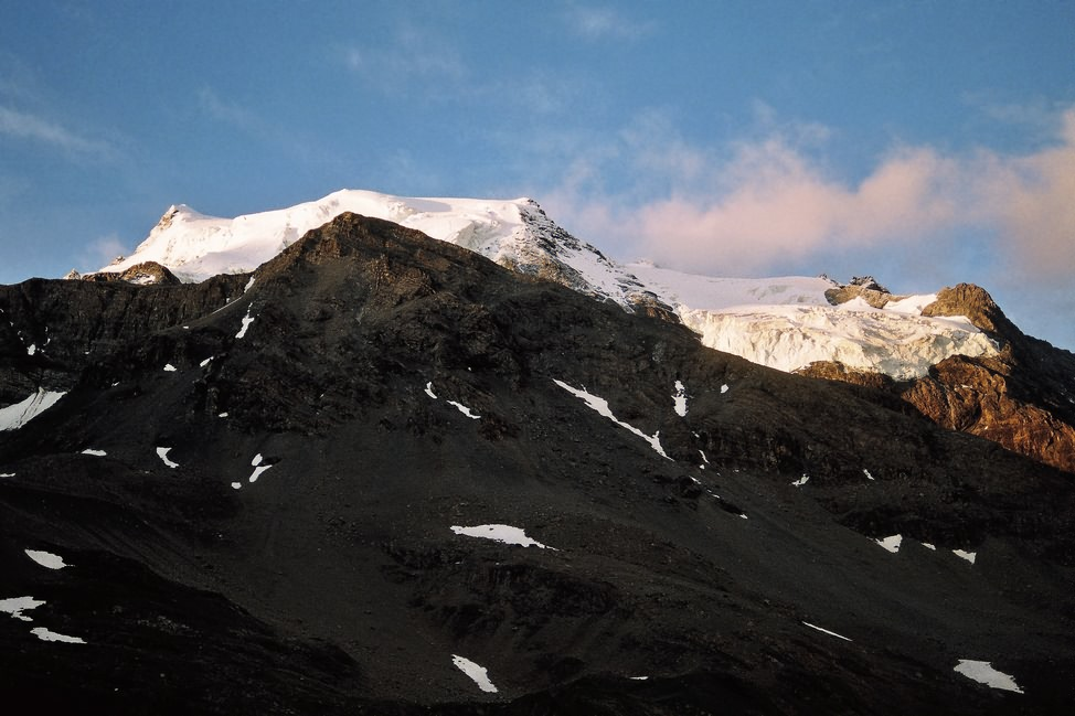 Východ slunce nad Ortlerem